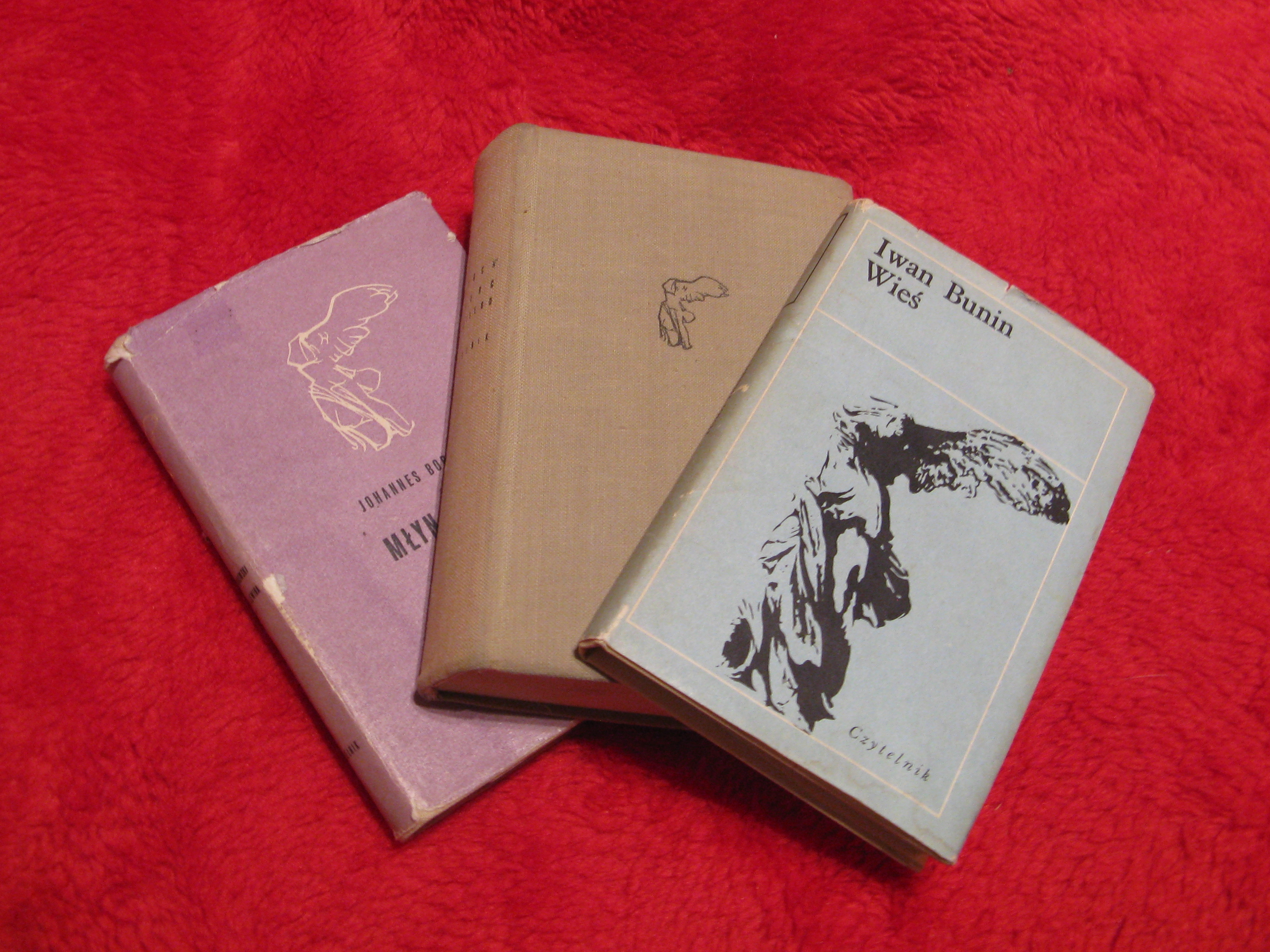 Trzy książki z serii wydawniczej Nike, wydawnictwo Czytelnik, środkowa bez obwoluty.